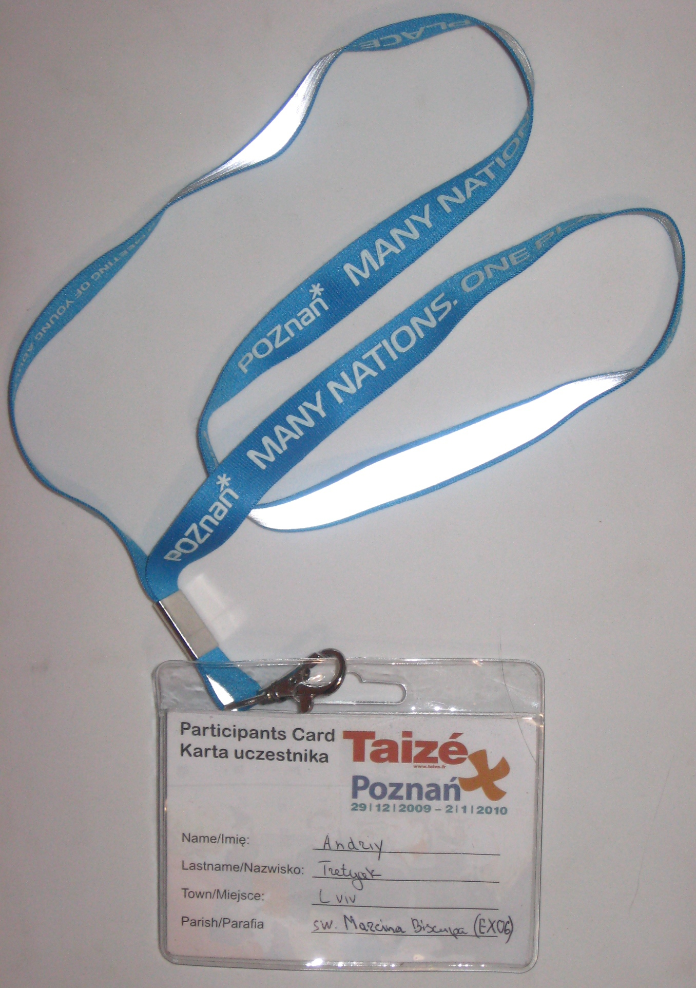 Ідентифікатор учасника молодіжного з'їзду молоді Тезе у Познані.